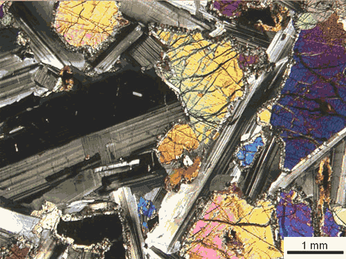 gabbro. nicol incrociati